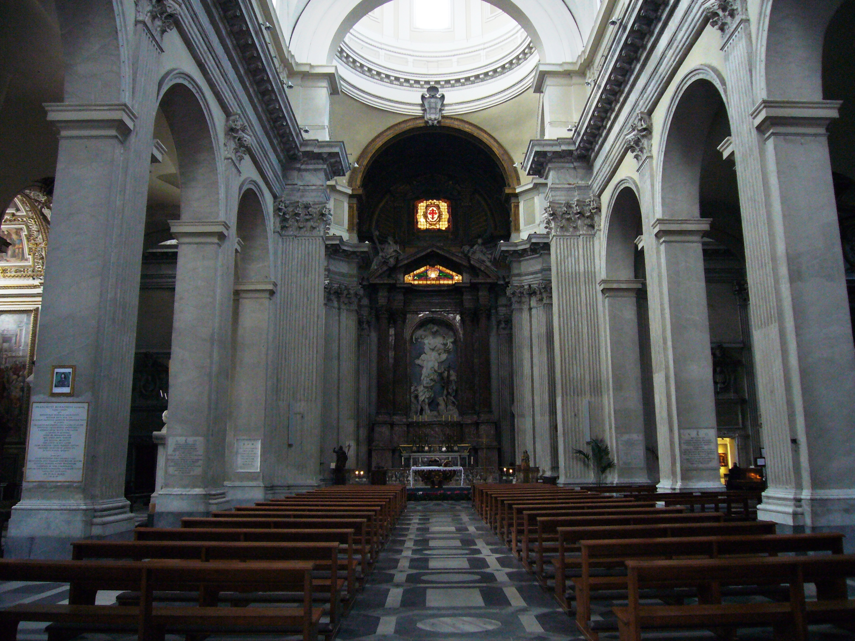 Roma, San Giovanni dei Fiorentini, interno